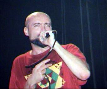 Reuno de Lofofora